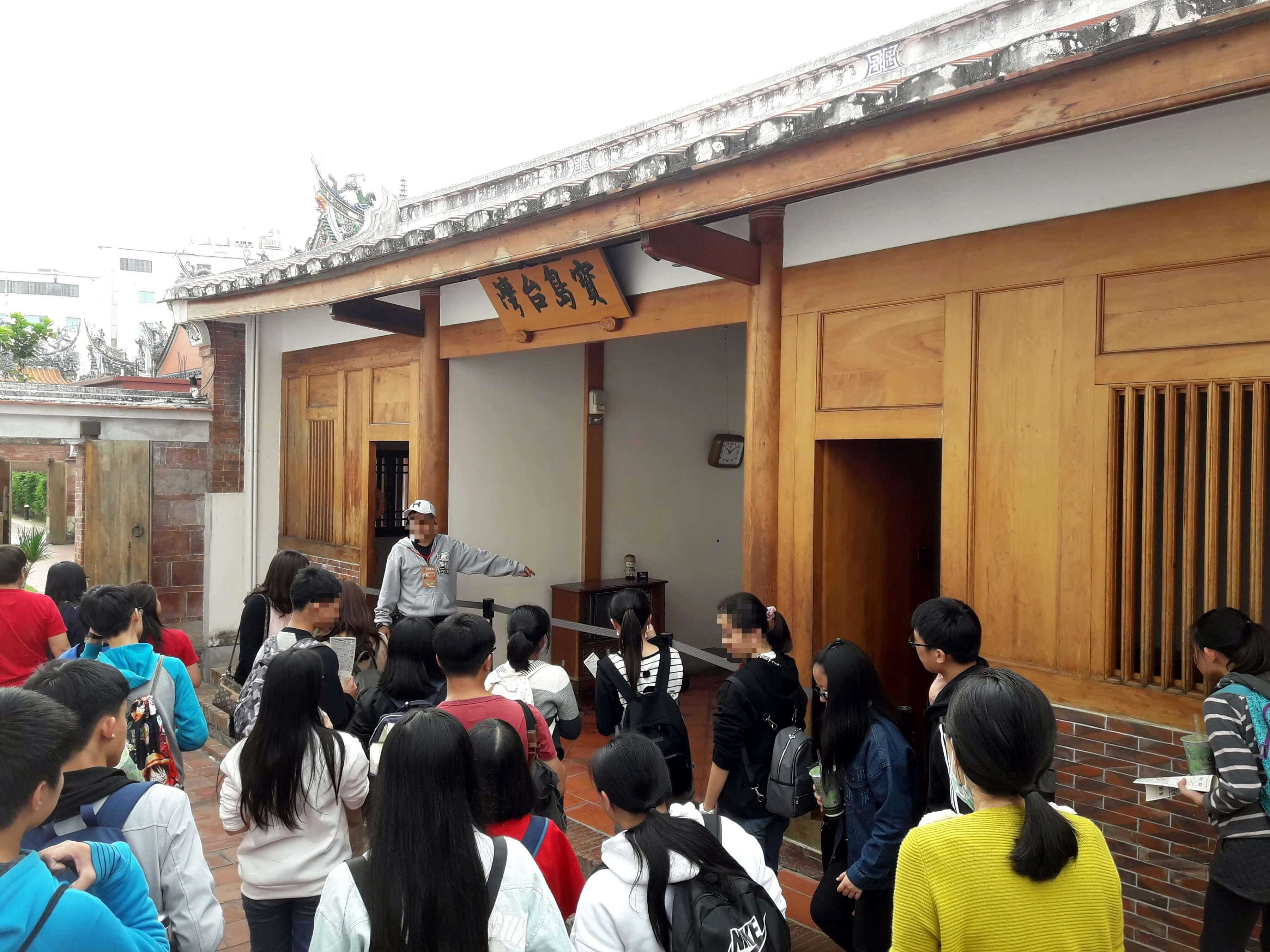 中文（台灣）: 雲林縣土庫國中九年8班的學生們參觀高雄市鳳山區鳳儀書院時認真聆聽導覽老師李約瑟先生解說。